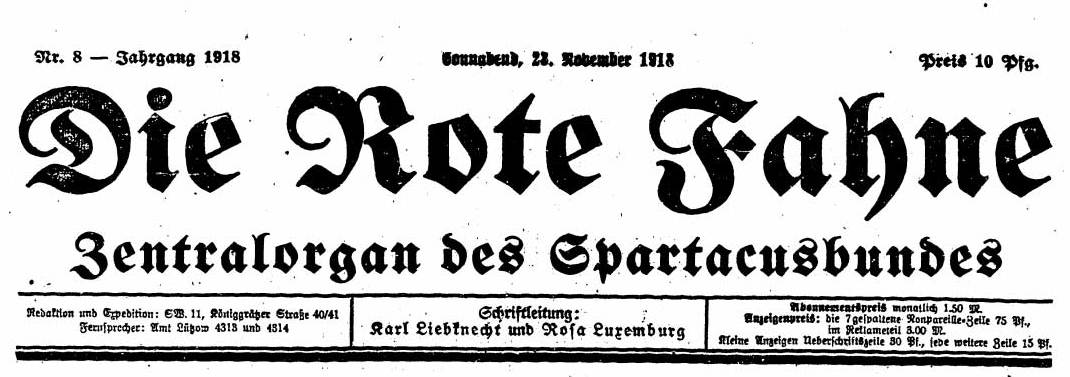 Deckblatt und Logo der "Roten Fahne" vom 23. November 1918